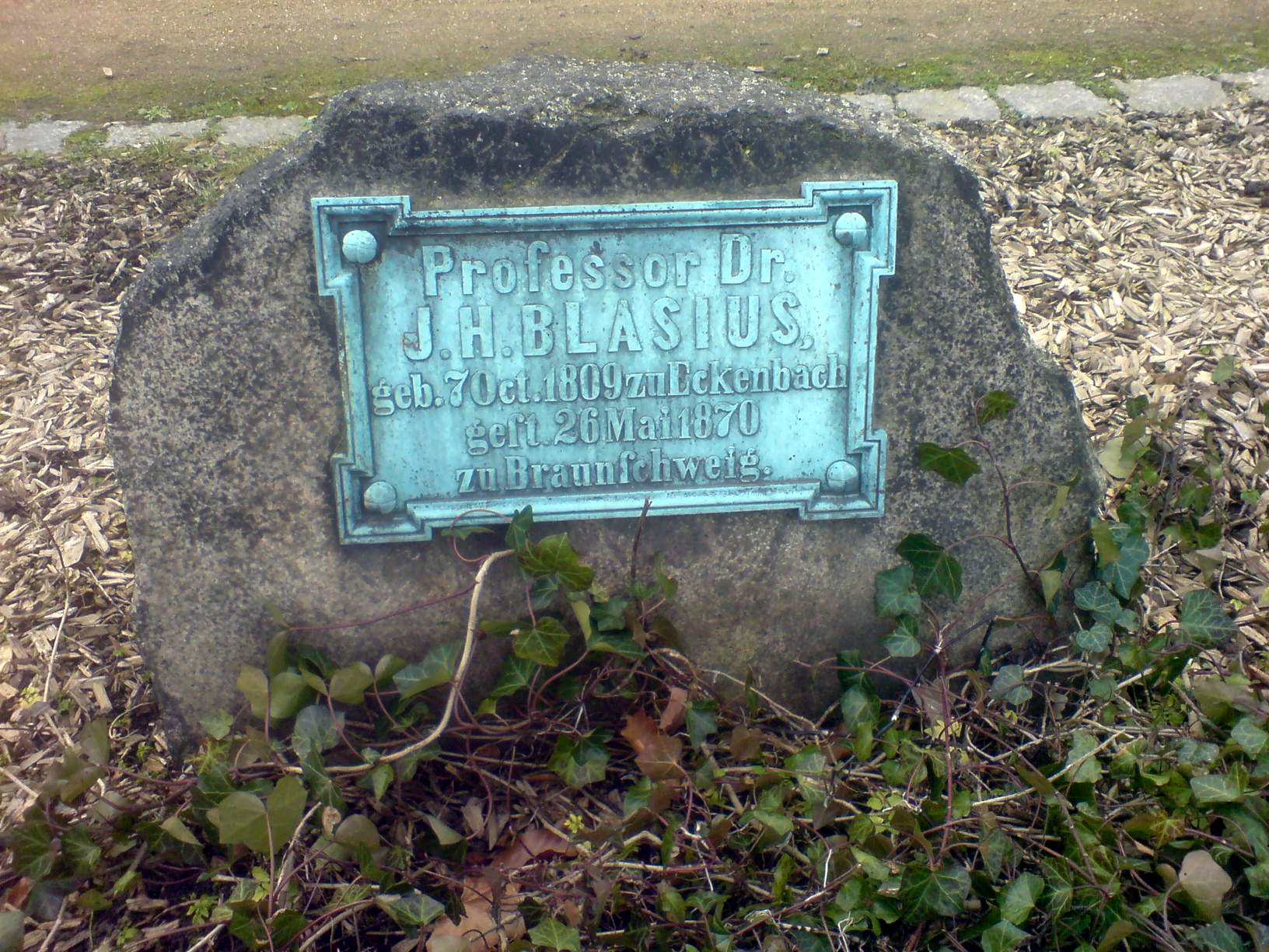 Grabinschrift: "Professor Dr. J.H. Blasius, geb. 7. Oct. 1809 zu Eckenbach, gest. 26. Mai 1870 zu Braunschweig." Foto aufgenommen auf dem Friedhof der Reformierten Gemeinde (Braunschweig, Juliusstrasse.)